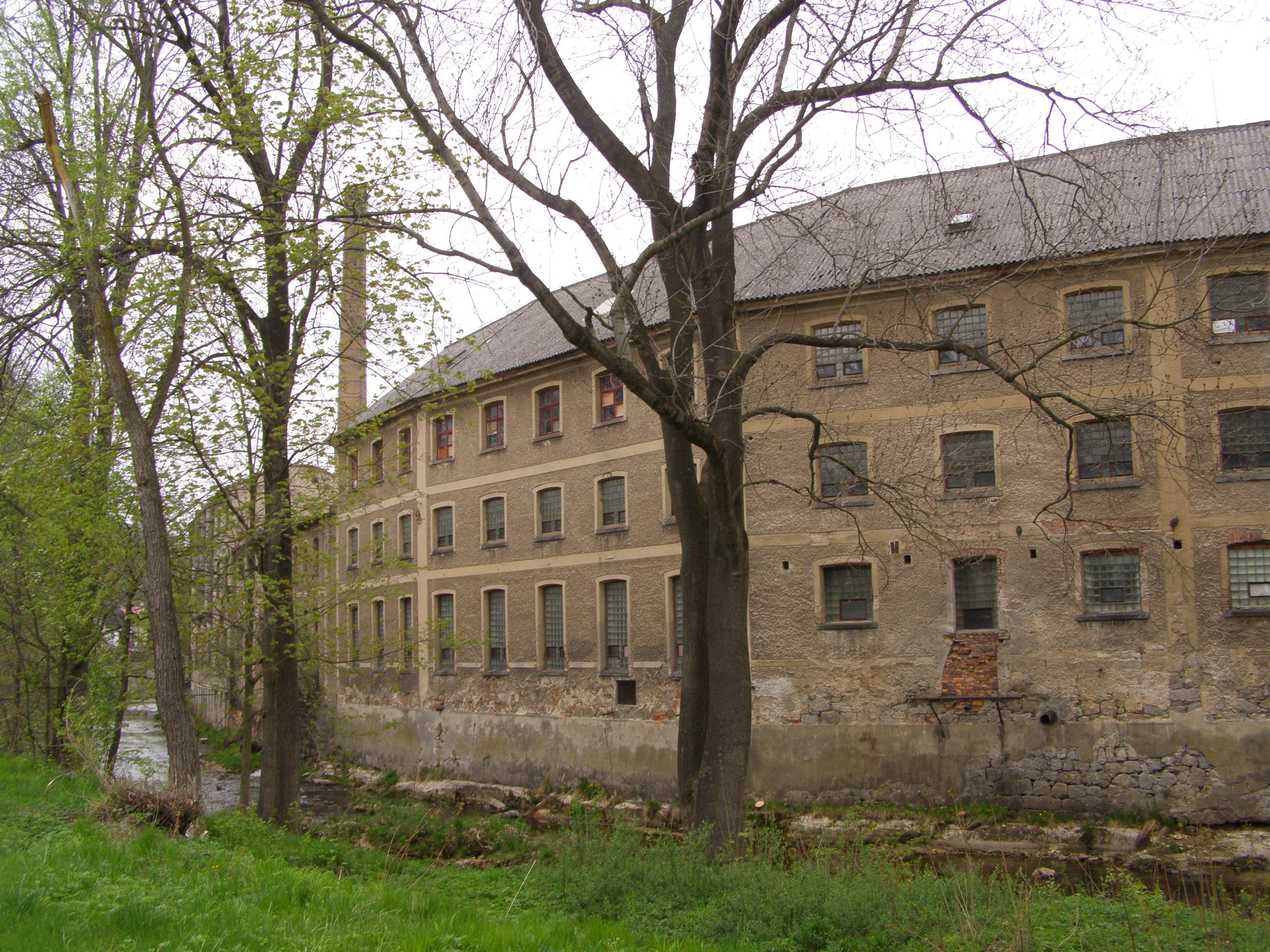 Raspenava, ulice Luční, stará továrna a řeka Smědá